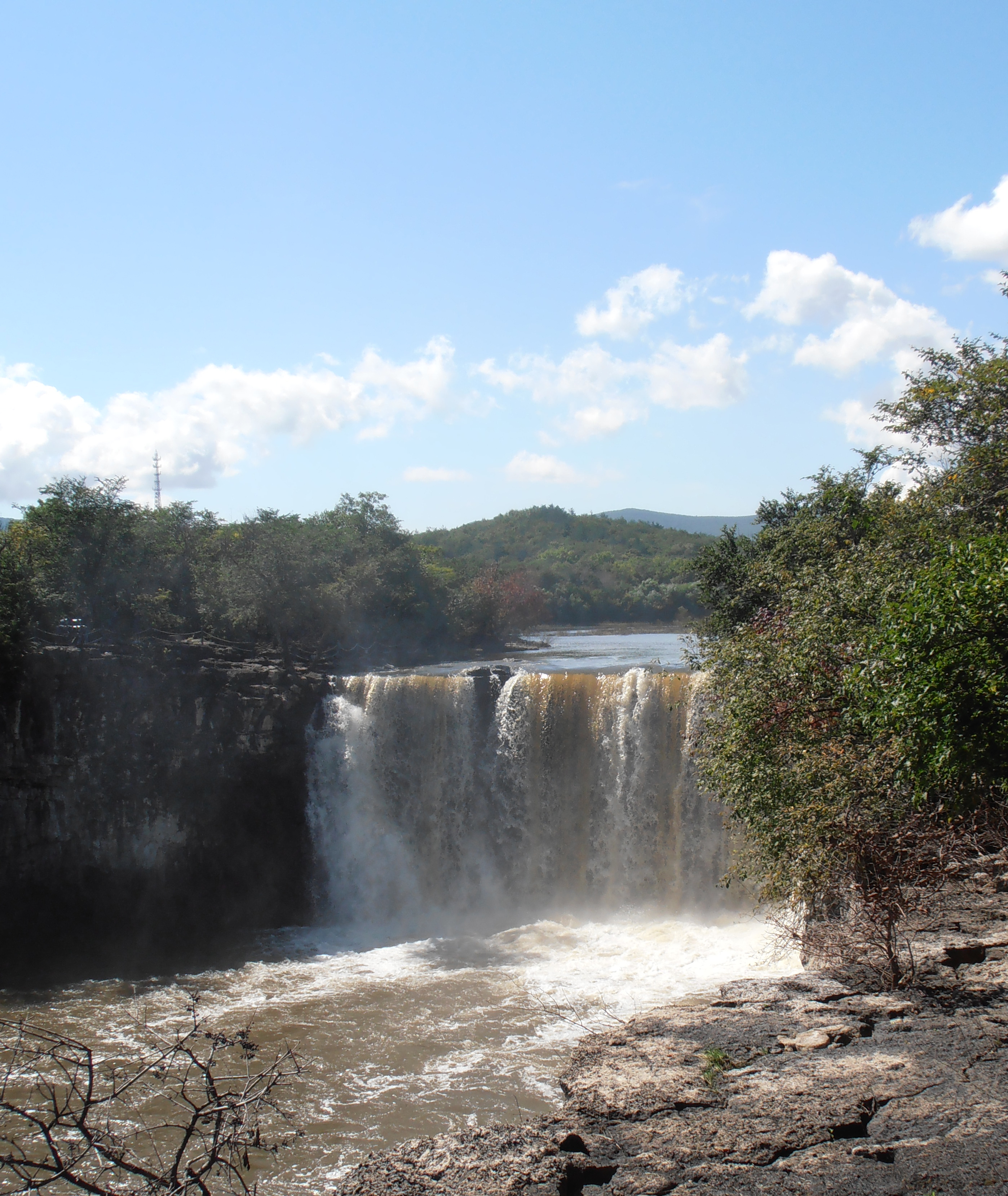 粵語: 吊水樓瀑布